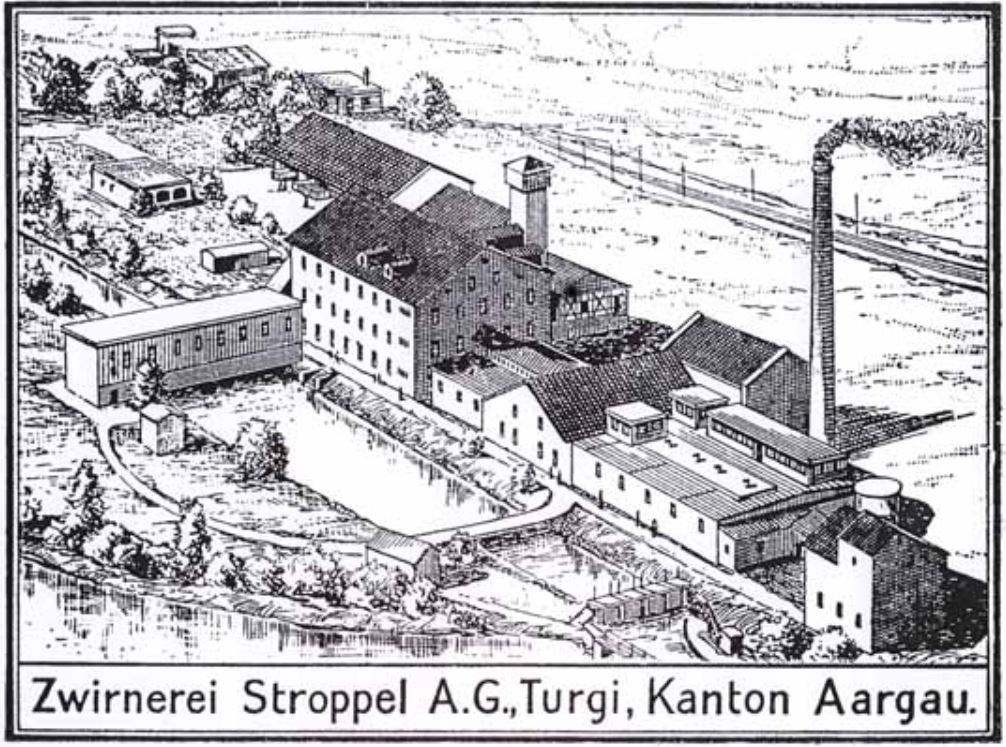 Baumwollzwirnerei Stroppel, Gebenstorf AG, Schweiz